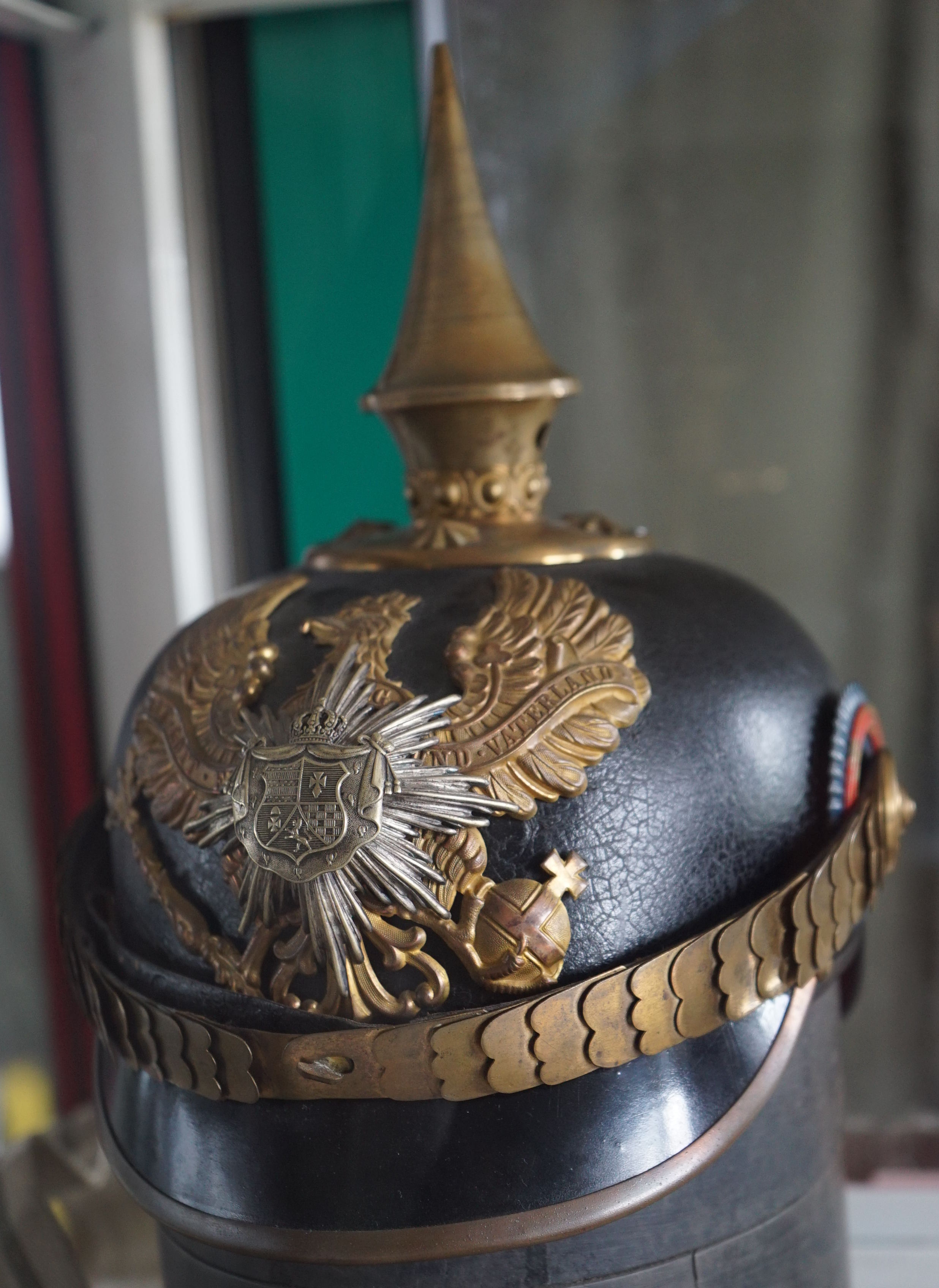 Casque d'officier du oldenburg, 91e IR.